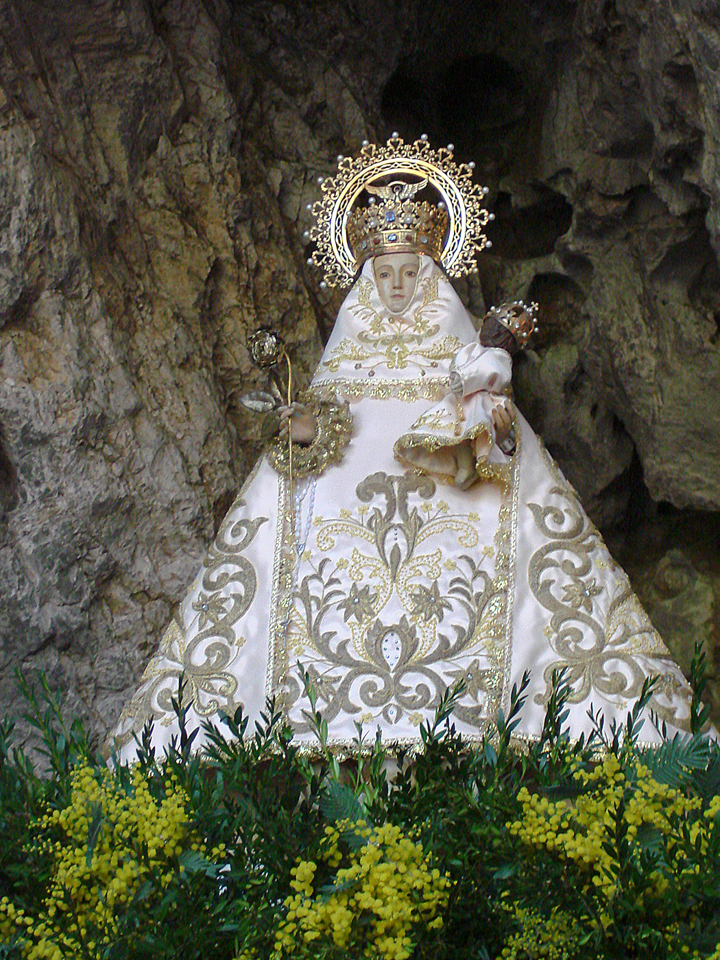 Imaxe de la Santina, davezu vistida de bermeyu.